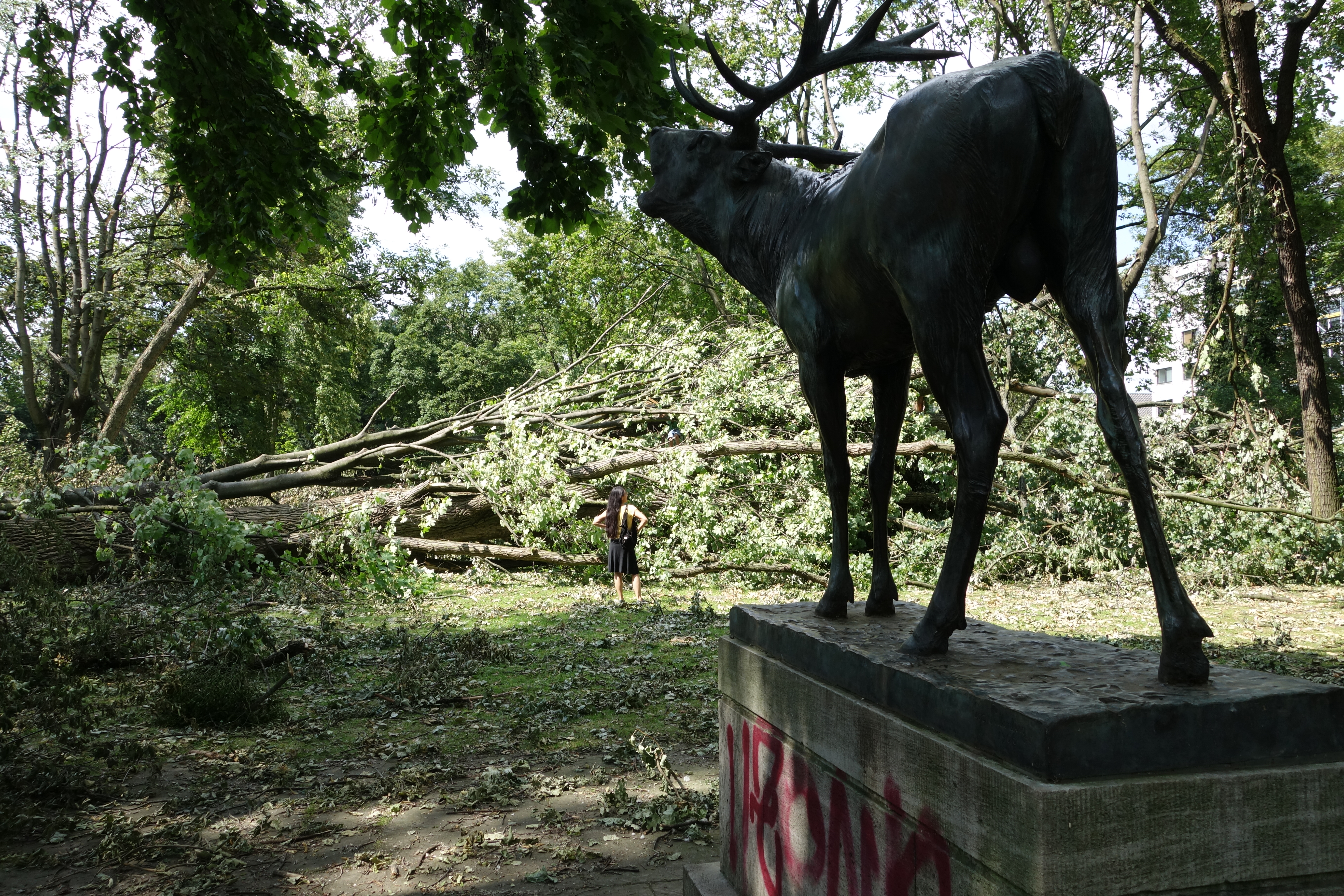 Röhrender Hirsch im Hofgarten, Düsseldorf, Deutschland. Sechs Tage nach dem großen Unwetter am 9. Juni 2014. Die Plastik Röhrender Hirsch ist ein Werk des Tierbildhauers Josef Pallenberg, das er 1907 im Alter von nur 25 Jahren schuf. Der erste Galvanoguss wurde inzwischen durch einen Bronzeguss ersetzt.